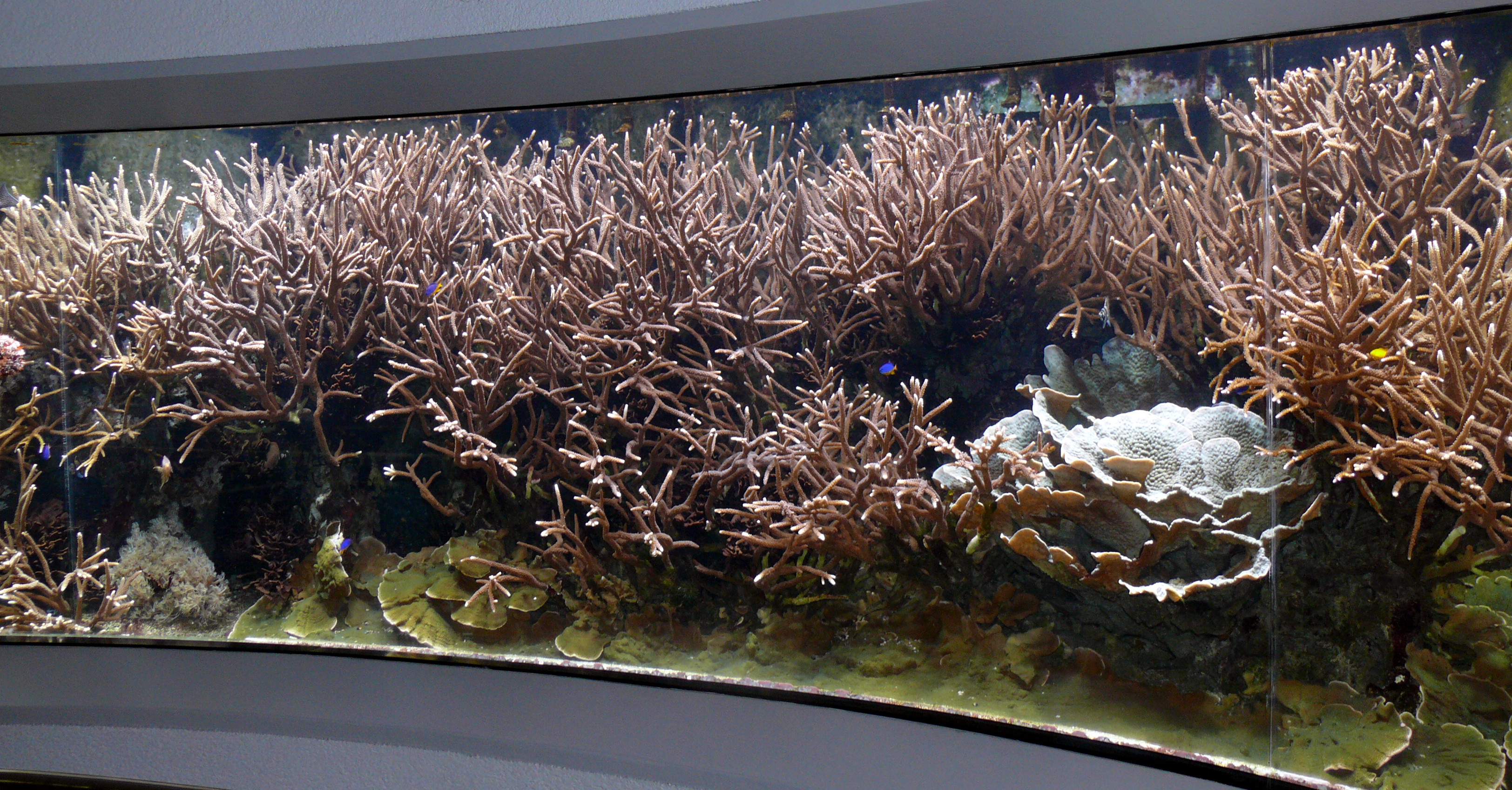 Riffaquarium